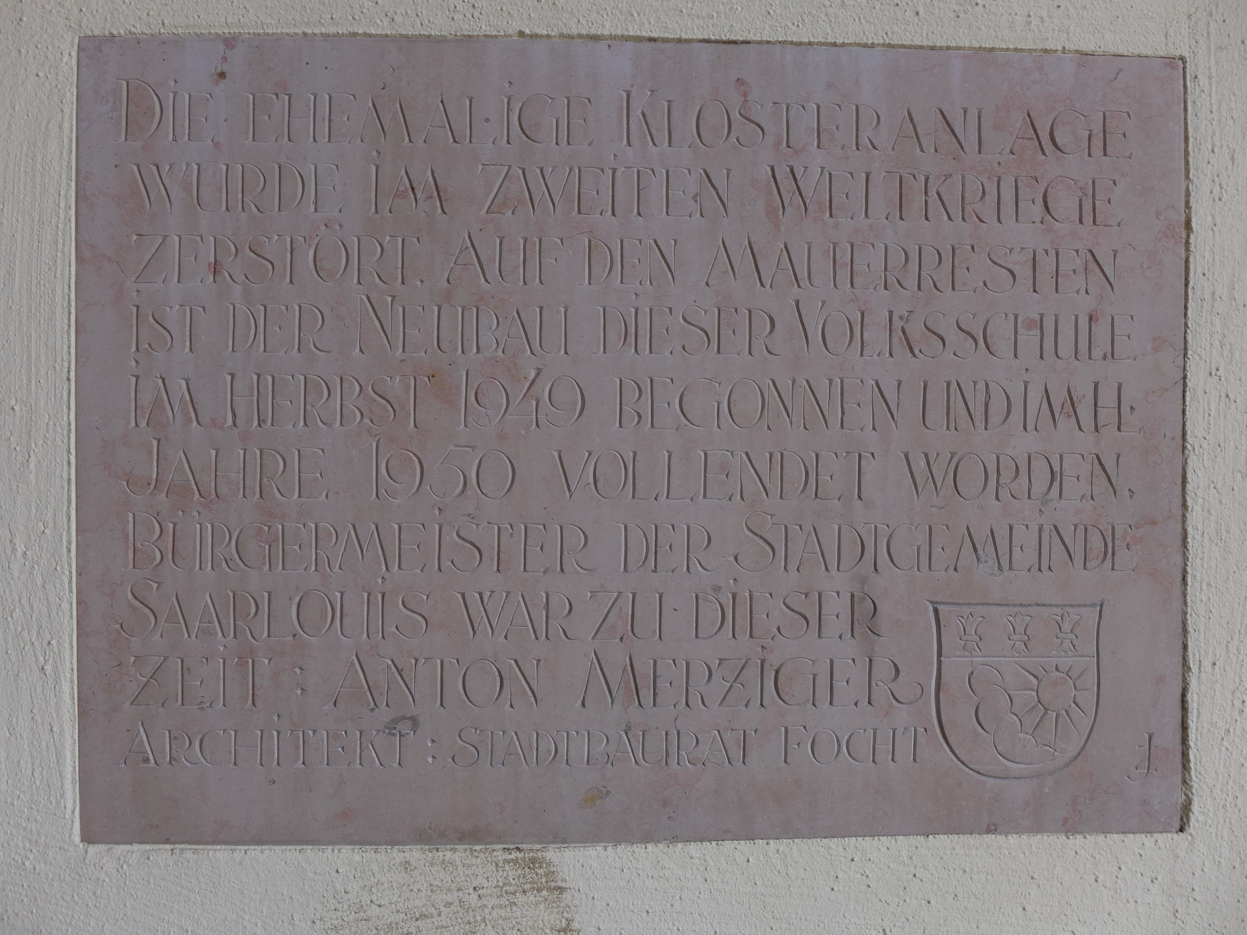 Ehemalige adelige Frauenabtei Fraulautern, Gedenkstein des Wiederaufbaus nach dem Zweiten Weltkrieg